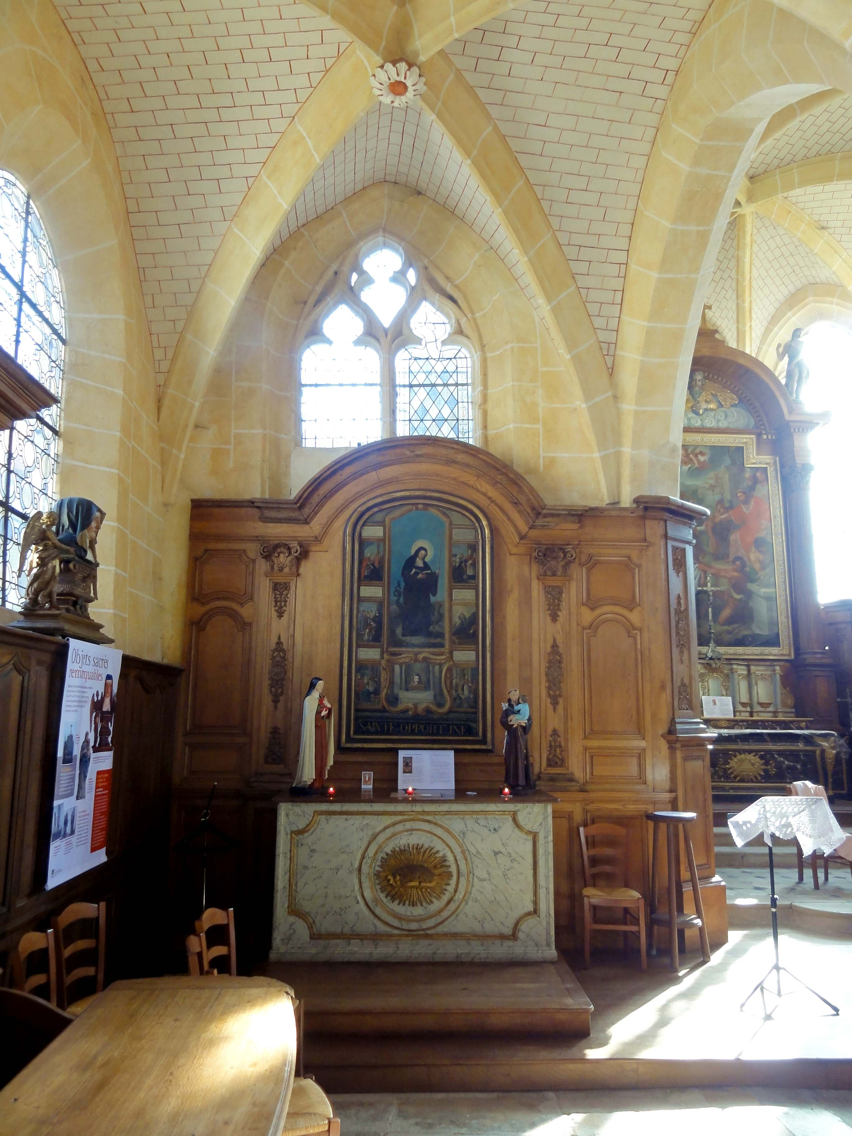 Interieur de l'église (voir titre).